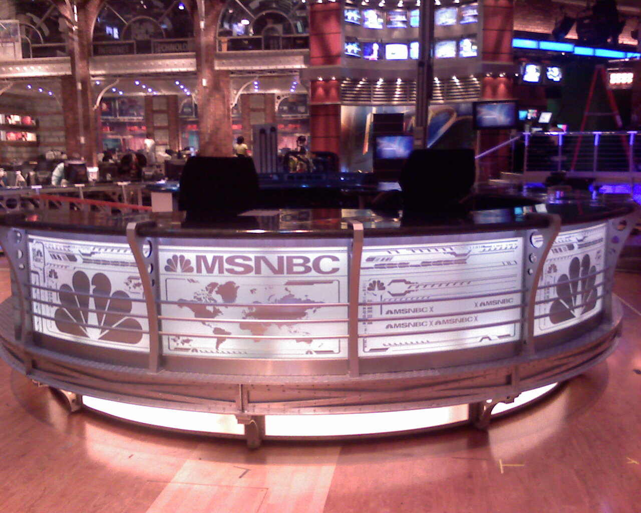 MSNBC NJ HQ